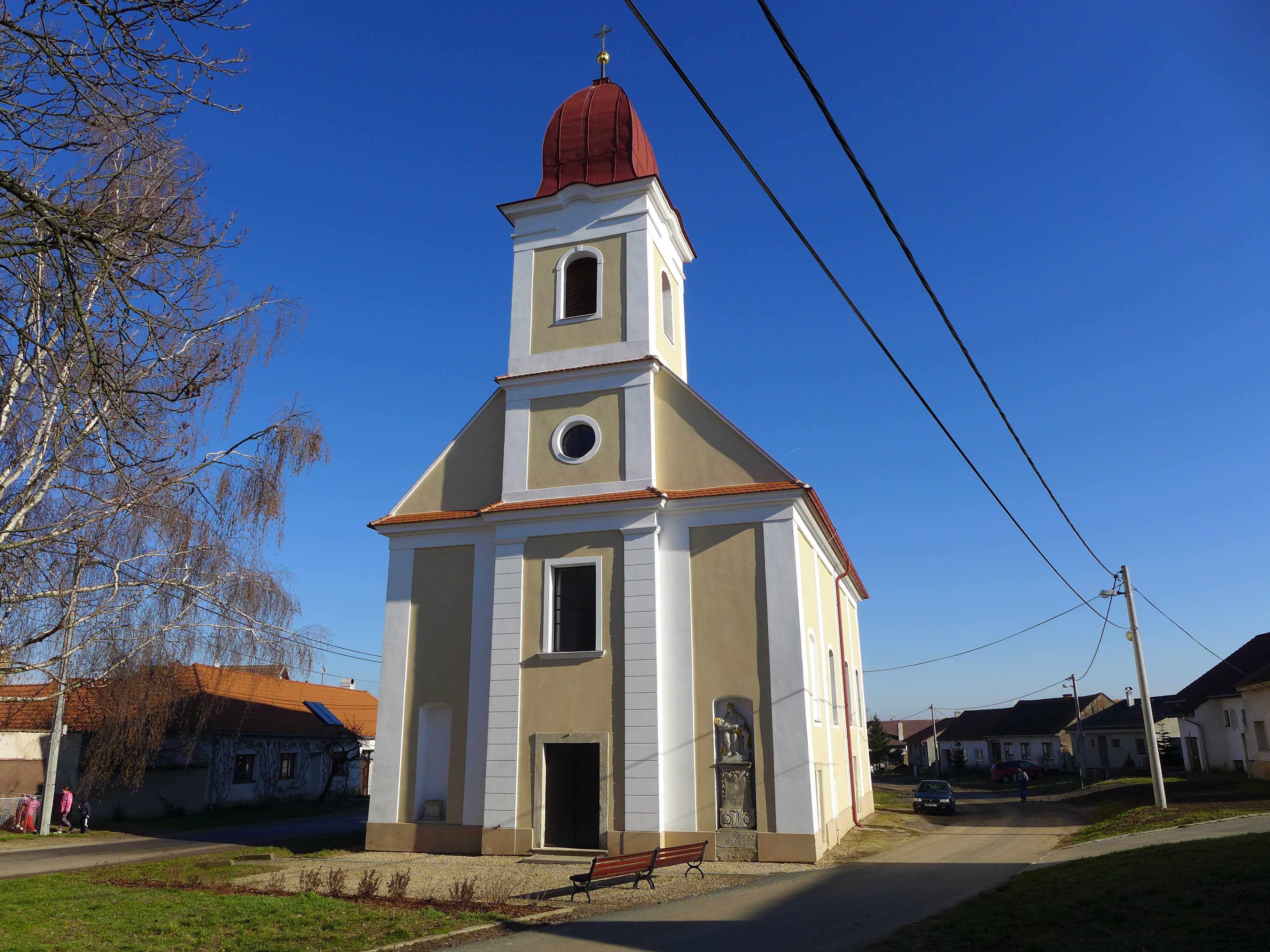 Kostel Bolestné Panny Marie, parc. 72, Načeratice.